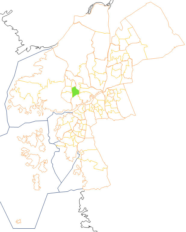 Karta som visar primärområdes belägenhet i Göteborg